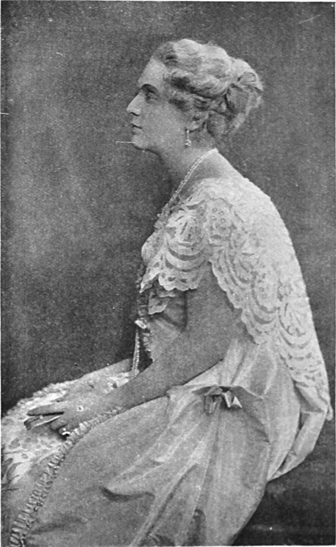 Den svenska skådespelerskan Lilly Jacobsson som drottning Caroline Mathilde av Danmark i Dikken von der Lyhe-Zernichows Stövlett-Kathrine på Viran Rydqvist-turnén 1917.